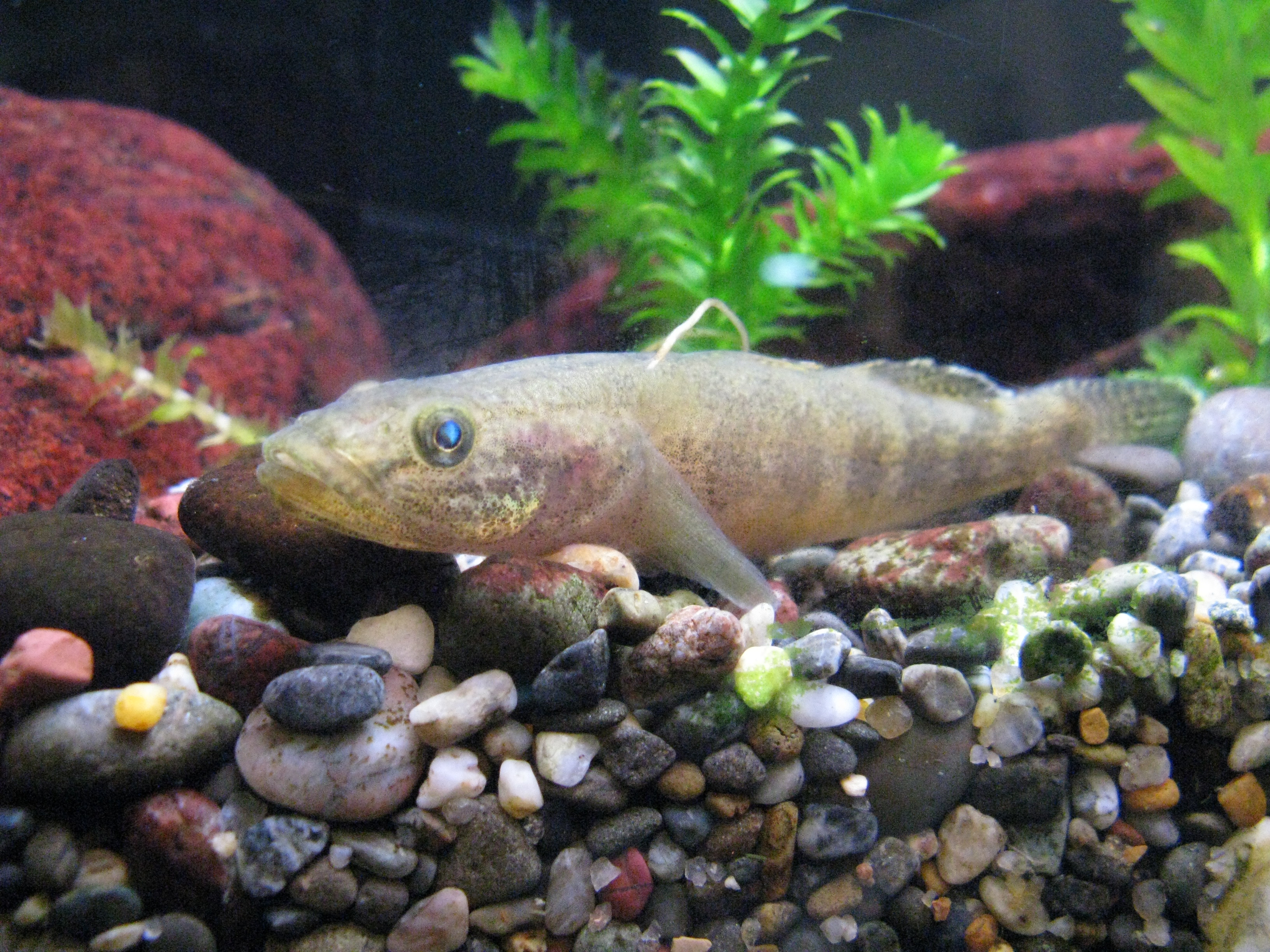 Scientific name Gymnogobius urotaenia